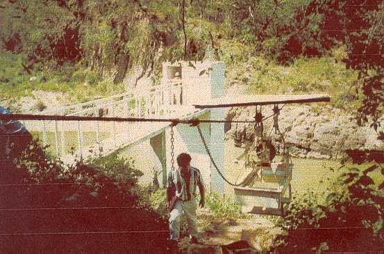 Sección de aforo de un río, se aprecia el pozo donde se situa el limnígrafo, y el teleferico para efectuar los aforos. Lugar: norte del Perú Autor: Alfredobi Fecha: aprox. 1999